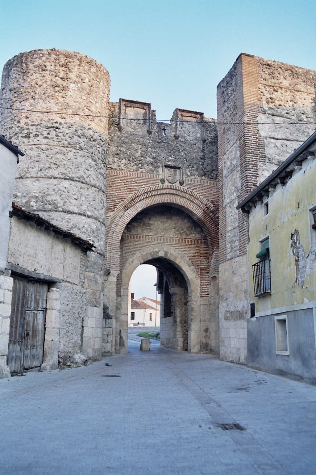 Segovia. (Castilla-León. España) Cuéllar. Arco de San Basilio. Fotografía realizada el 23 agosto de 2002 por el autor. User:Pelayo2